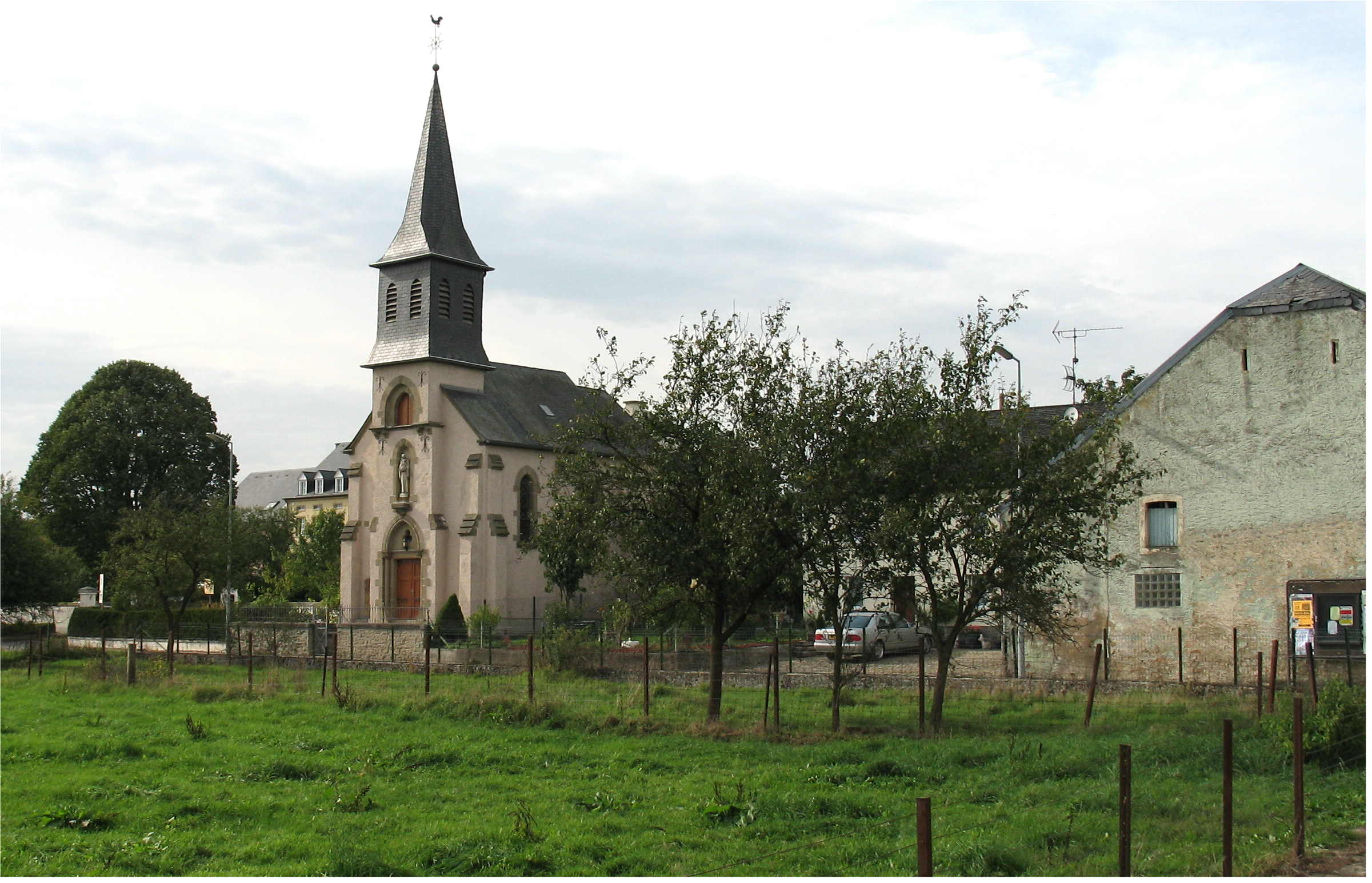 Sujet :Haastert Source : Eege Foto vum Johnny Chicago Lizenz